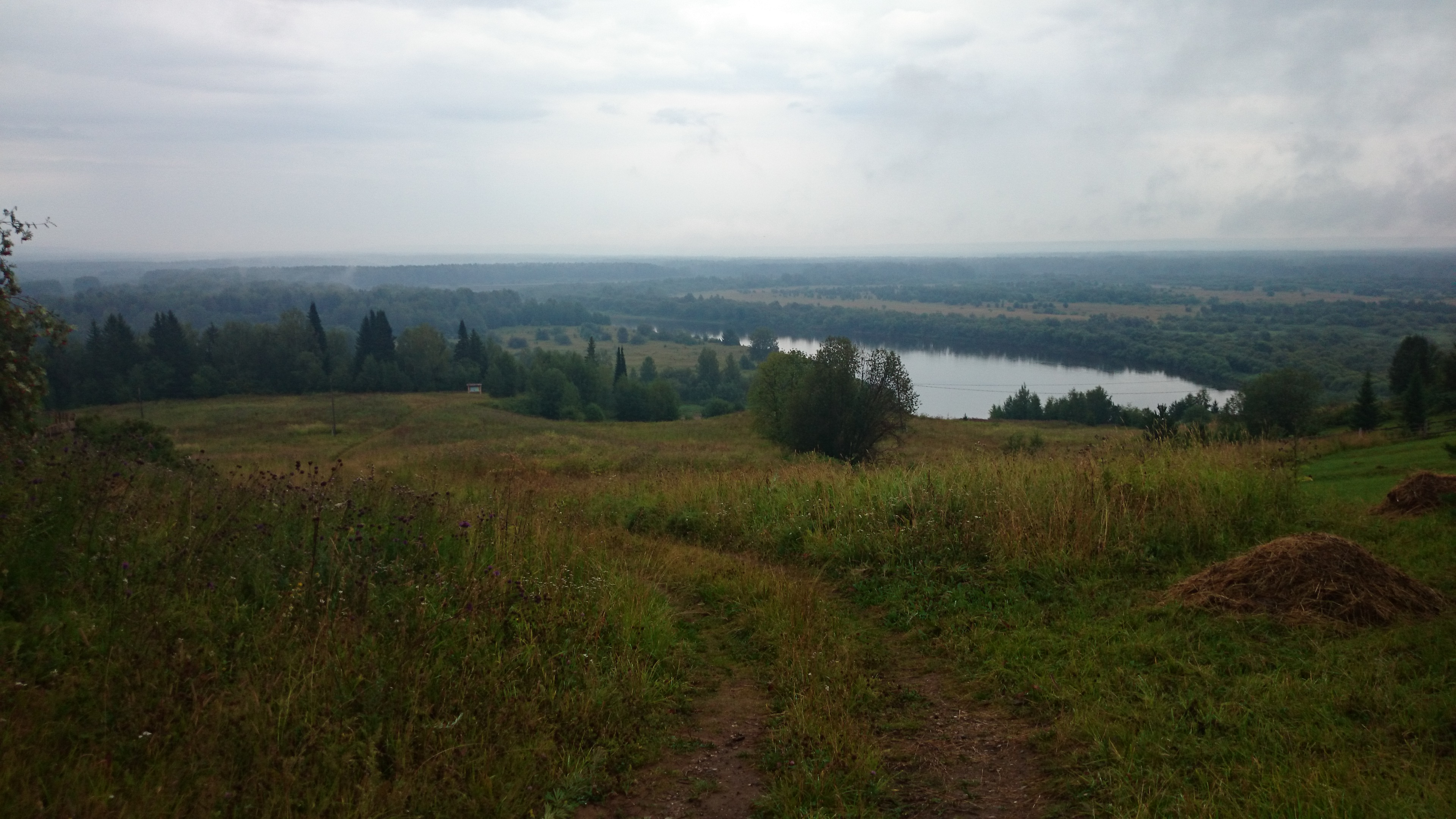 Каргортский, Сыктывдинский район This image is related to the protected area of Russia number 1110297